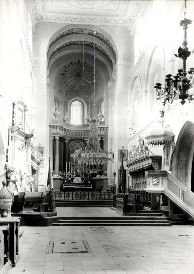 Wnętrze Kolegiaty w Tumie